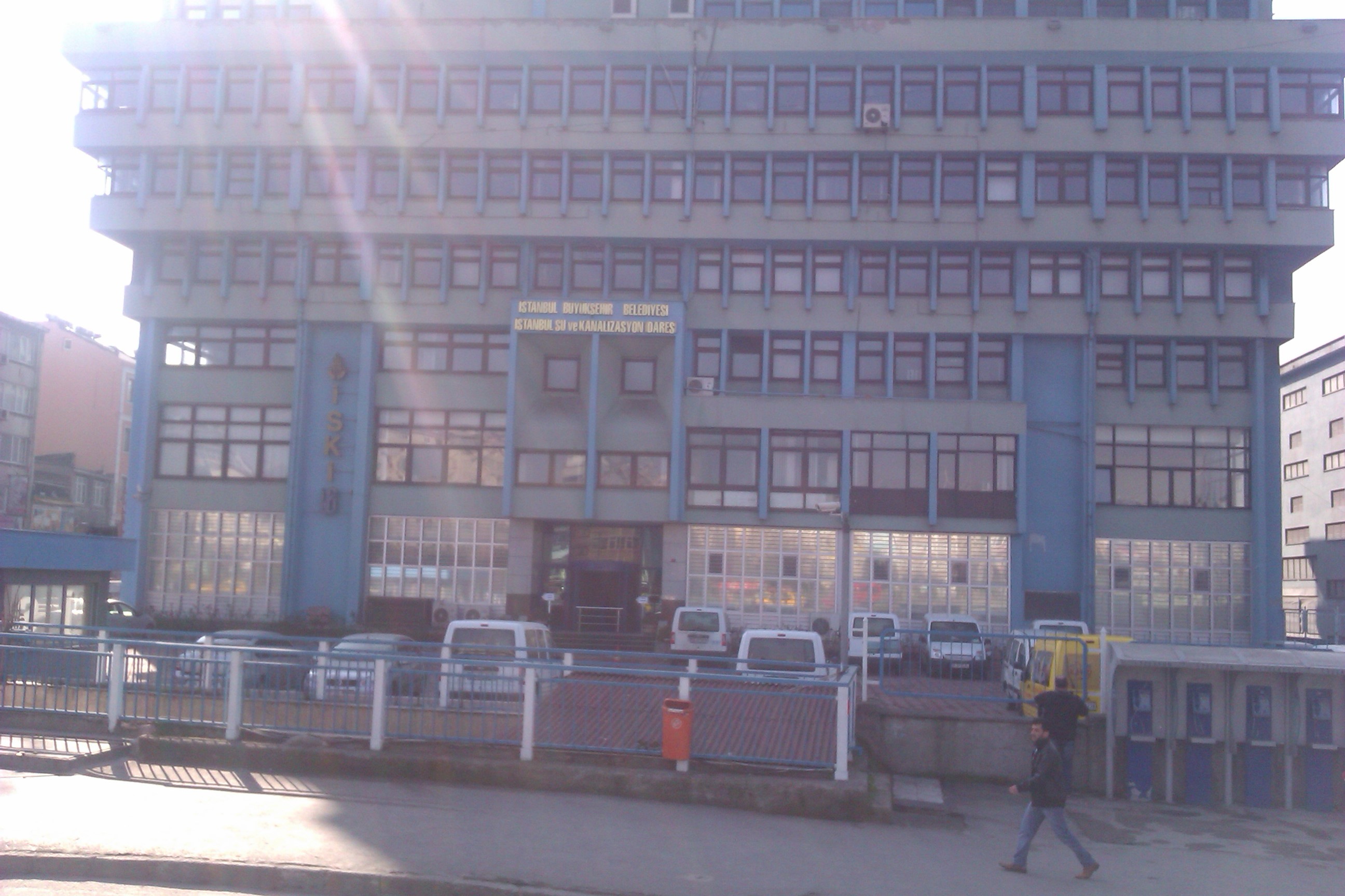 Fatih Aksaray Kanalizasyon idaresi